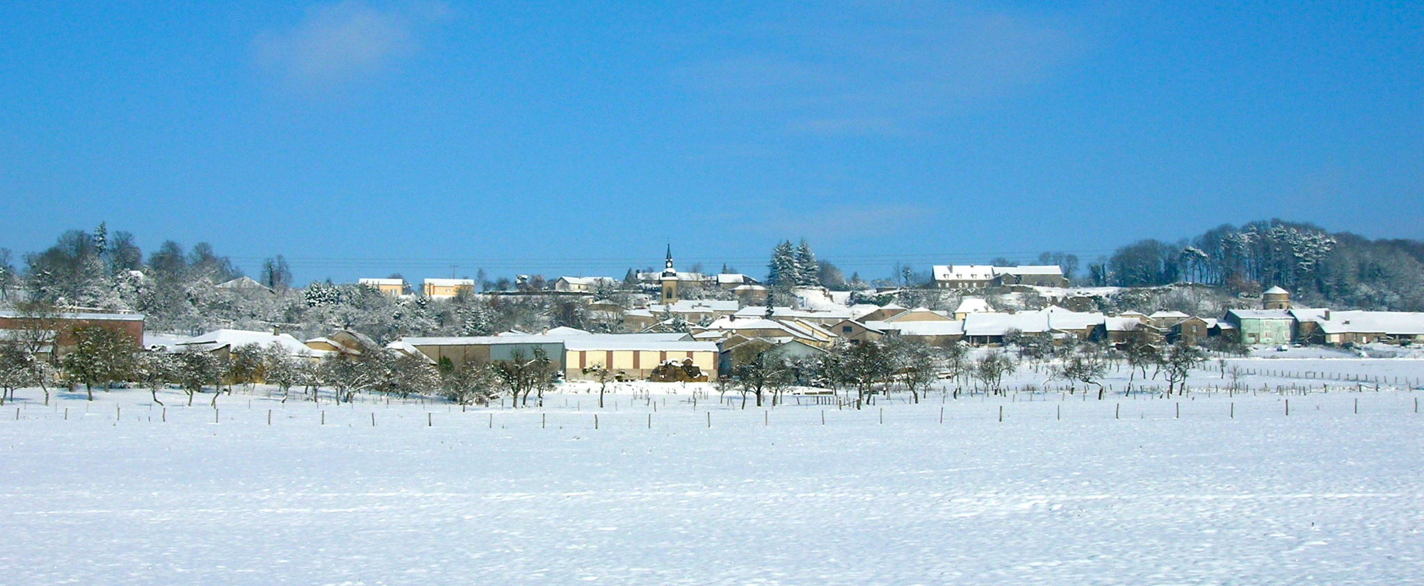 Neige à Beaufremont 12-2006